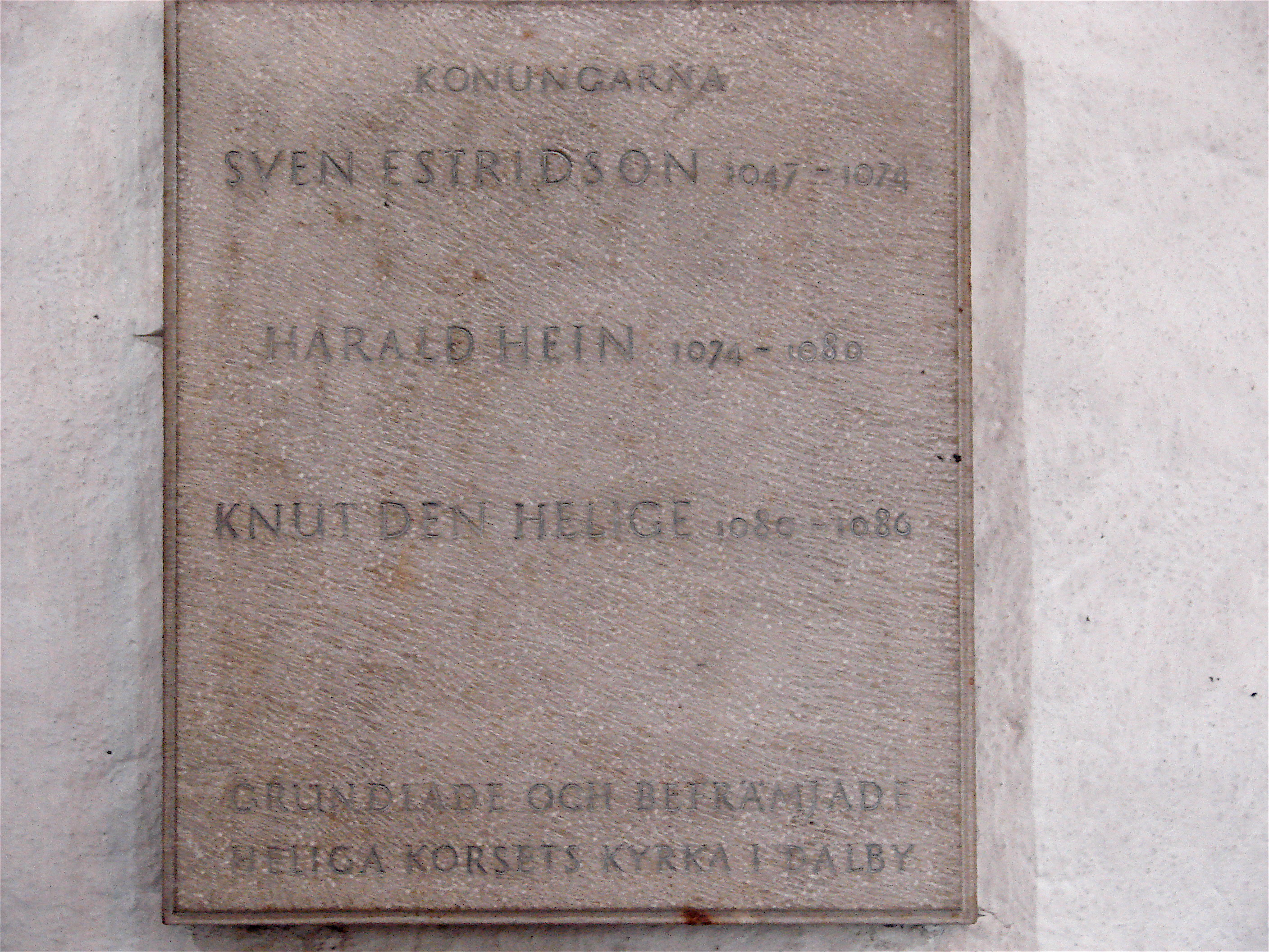 Hellig kors kirke Dalby, Svend Estridsen, Harald Hen, Knud den Hellige